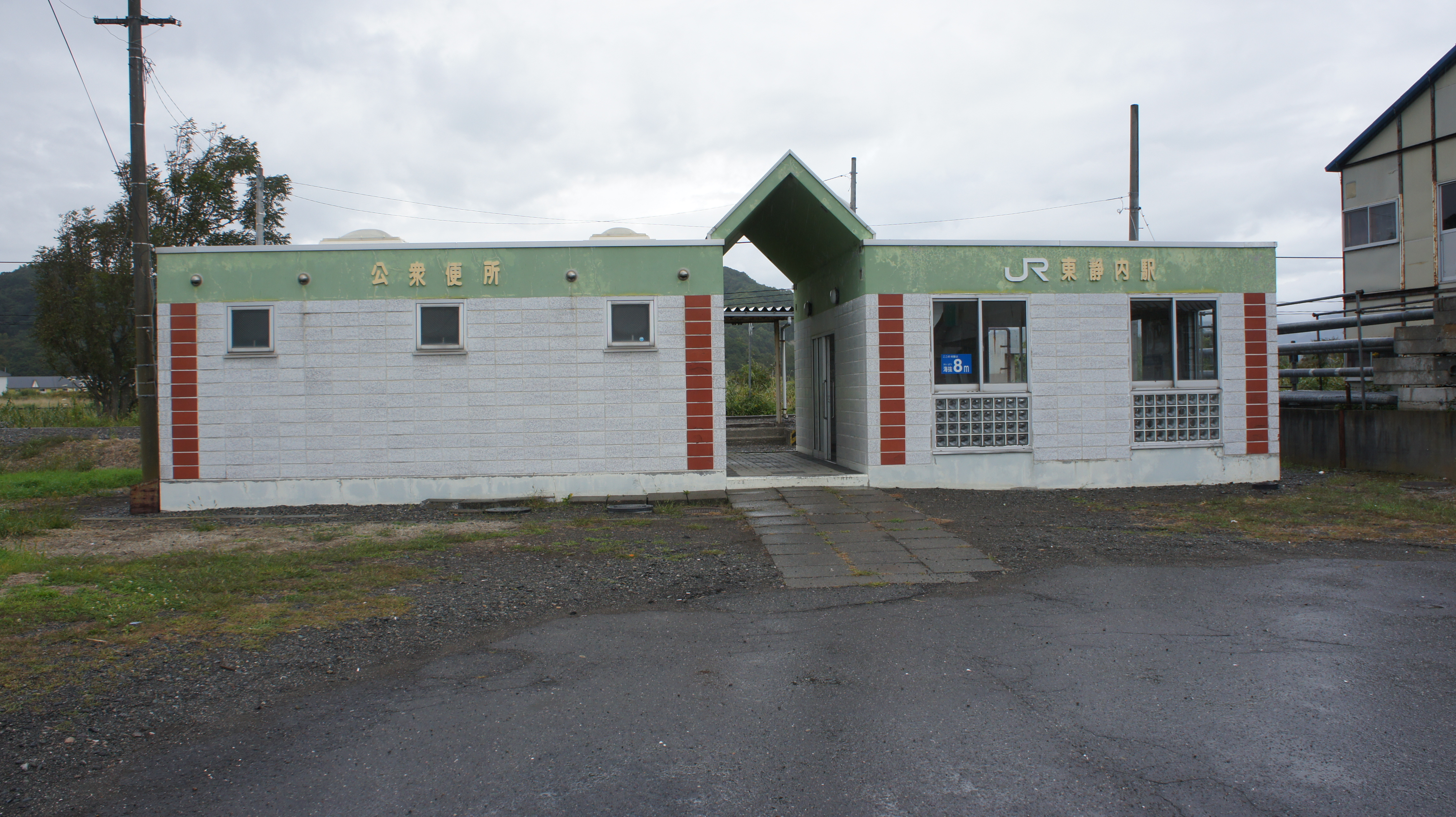 JR日高本線・東静内駅の駅舎